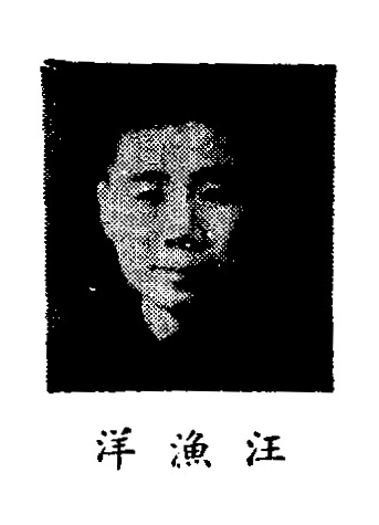 中文（中国大陆）: 制憲國民大會代表